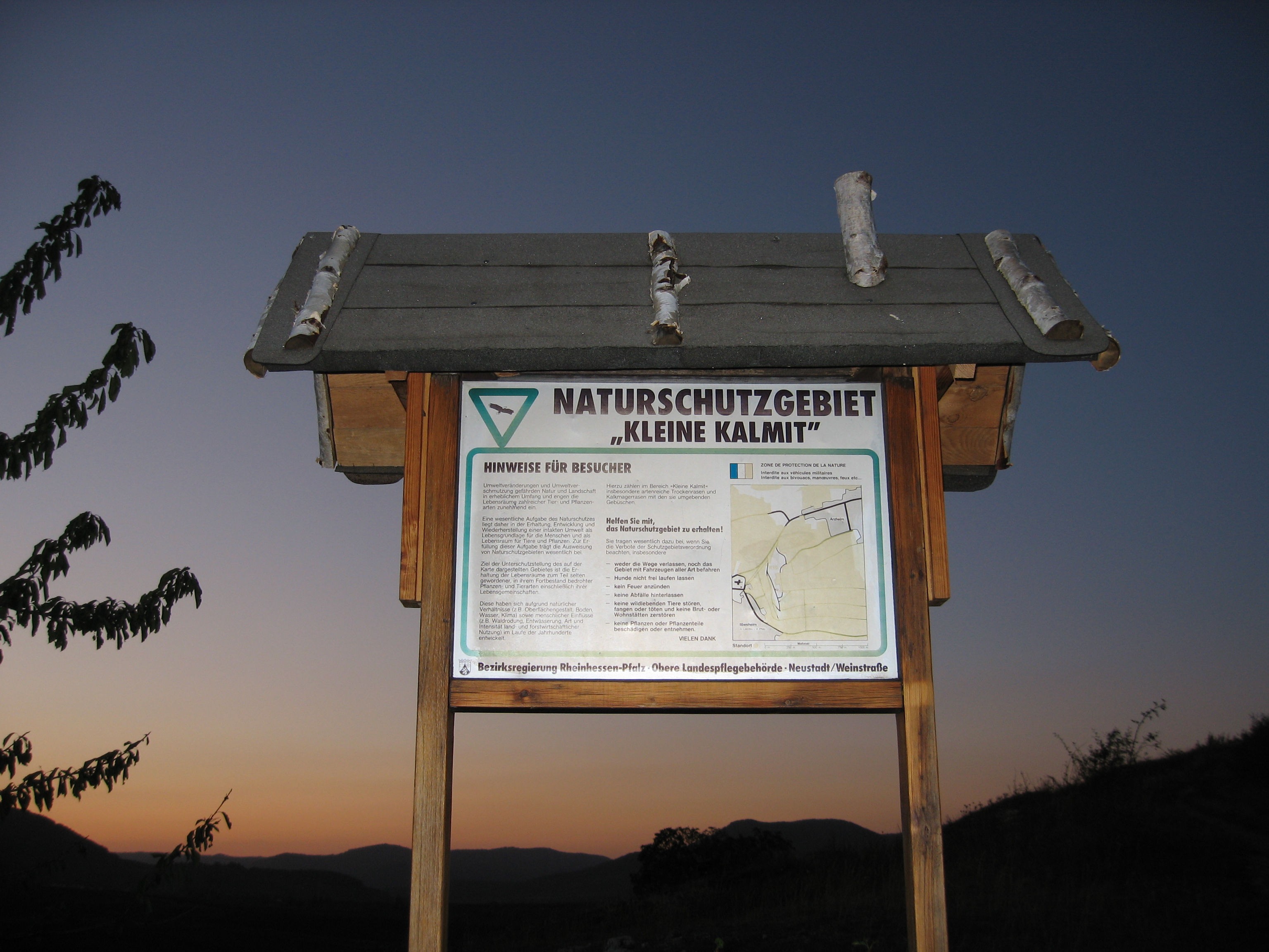 Hinweisschild auf das Naturschutzgebiet "Kleine Kalmit" bei Landau in der Pfalz